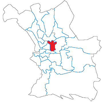 Situation du canton dans la ville de Marseille